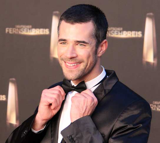 Jo Weil beim Deutschen Fernsehpreis 2012